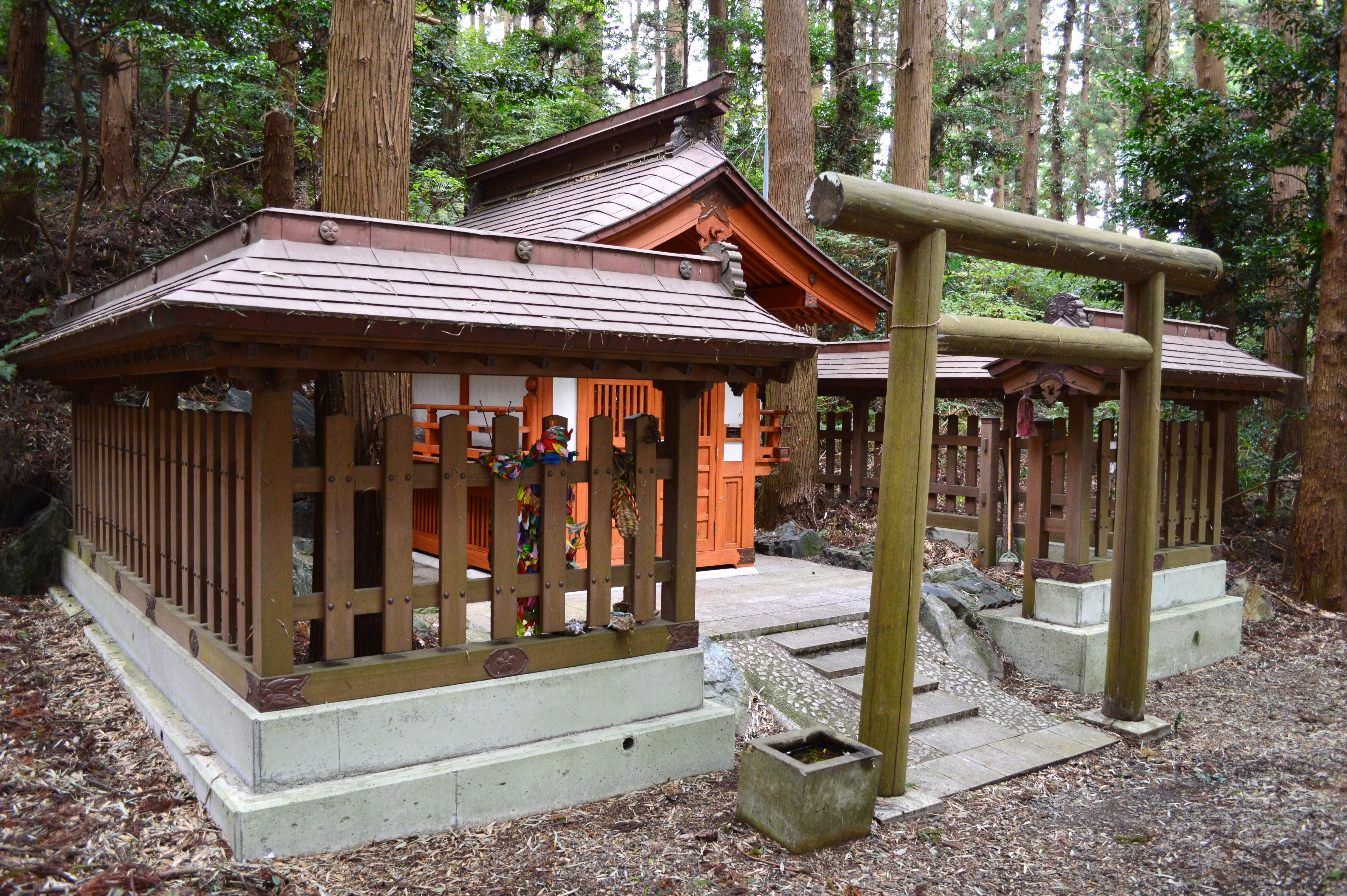 静神社 (那珂市) 末社・手接足尾神社